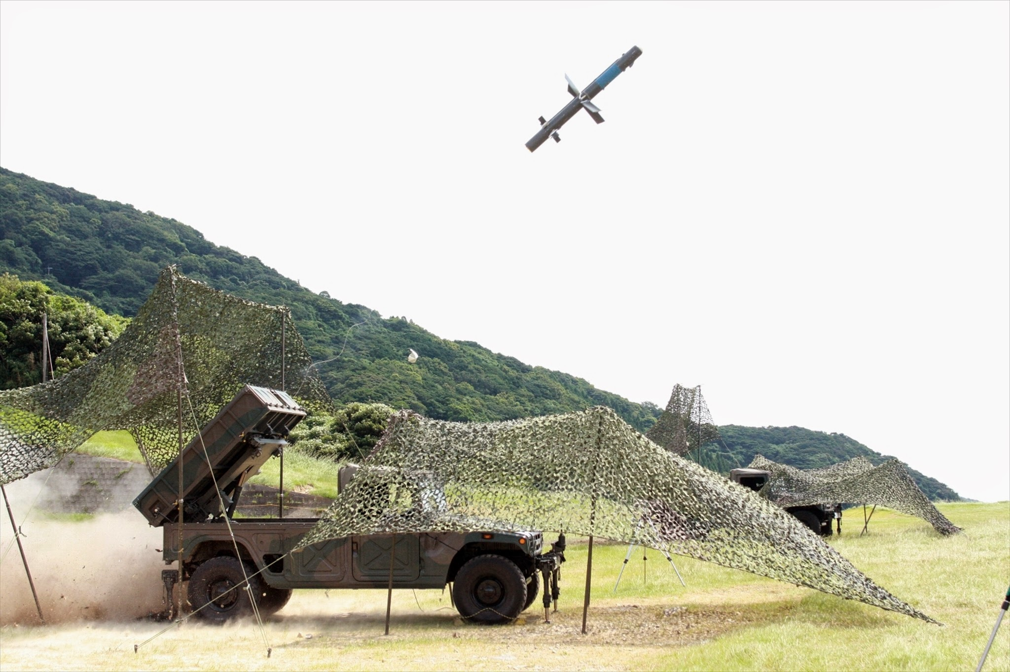 ９６式多目的誘導弾システム